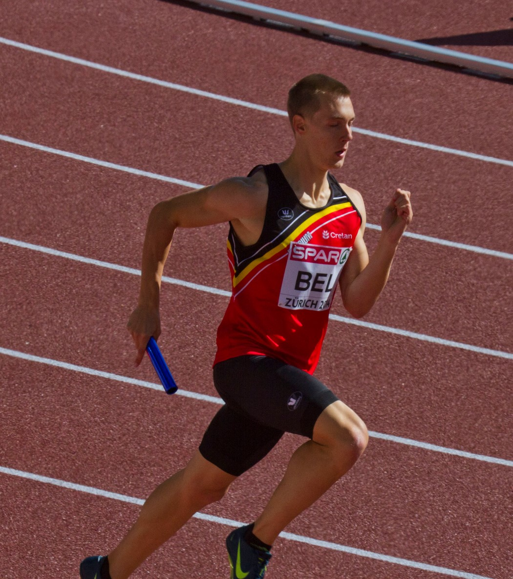 990326 4X400m watrin